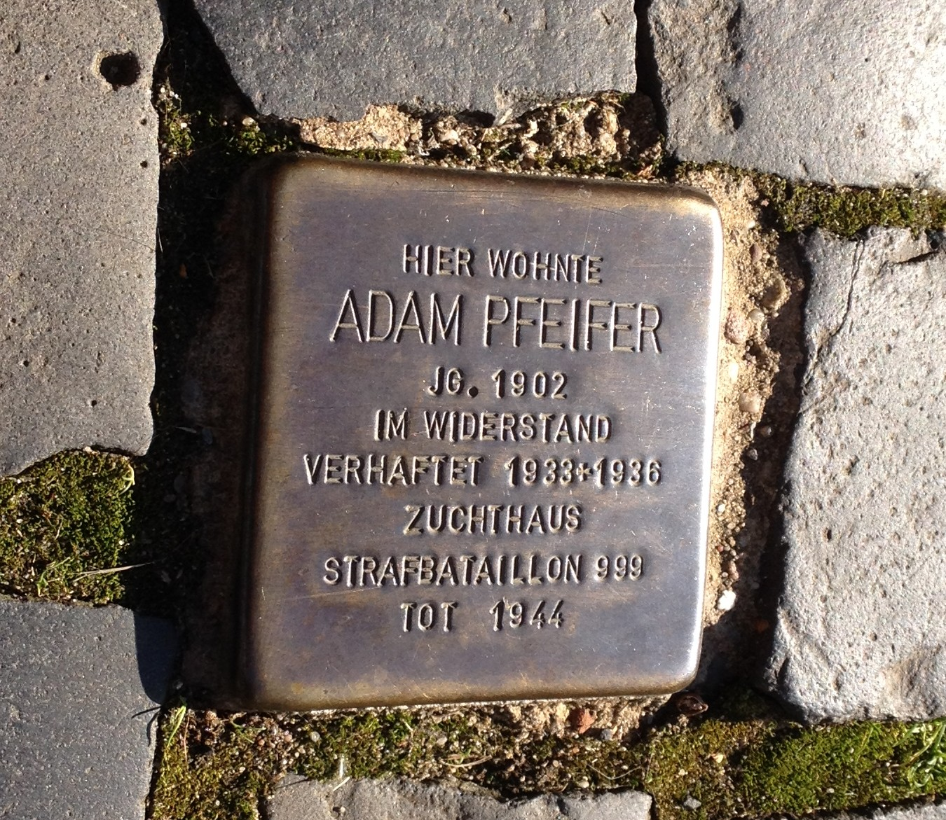 vor Haus Philipp-Reis-Str. 23 in 63073 Offenbach am Main-Bieber, Hessen, Germany